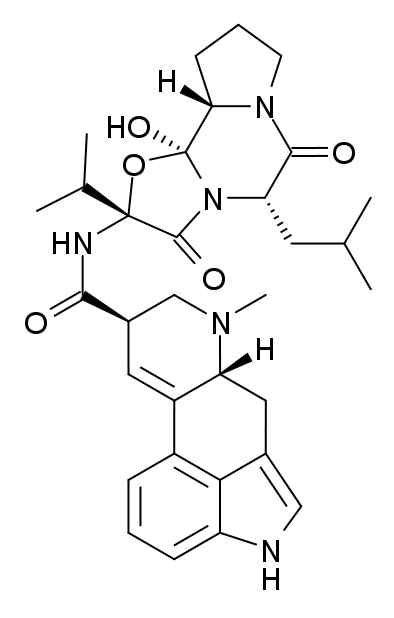 Molécule d'ergokryptine